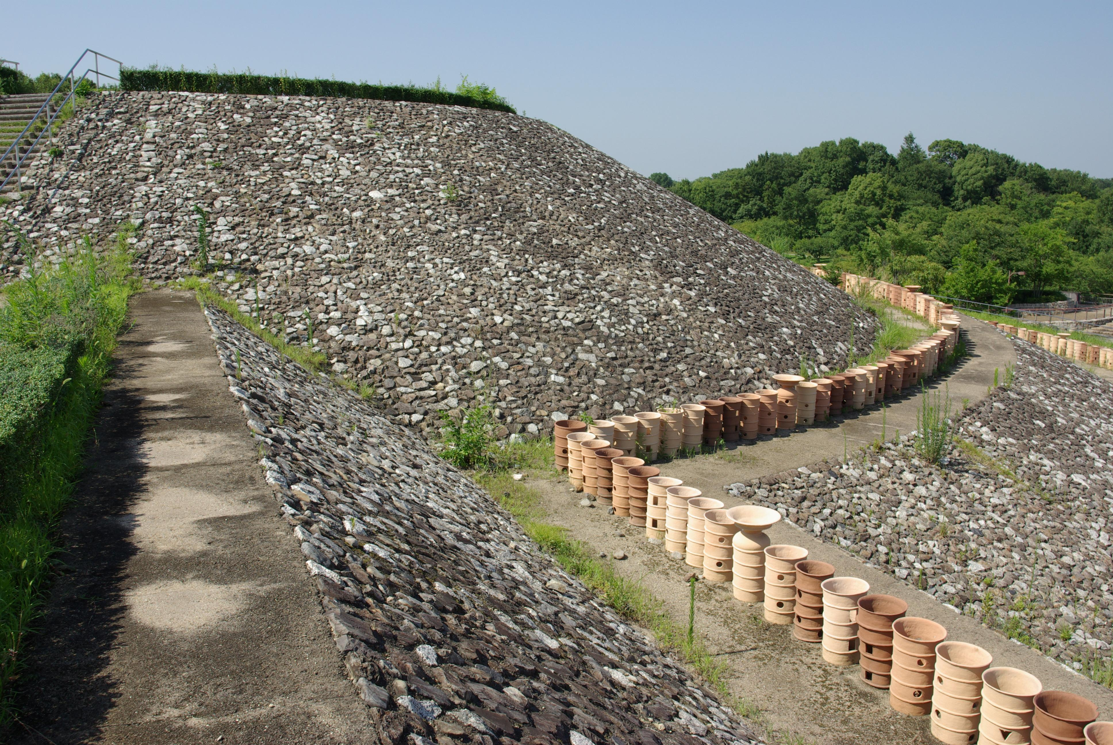 復元されたナガレ山古墳くびれ部